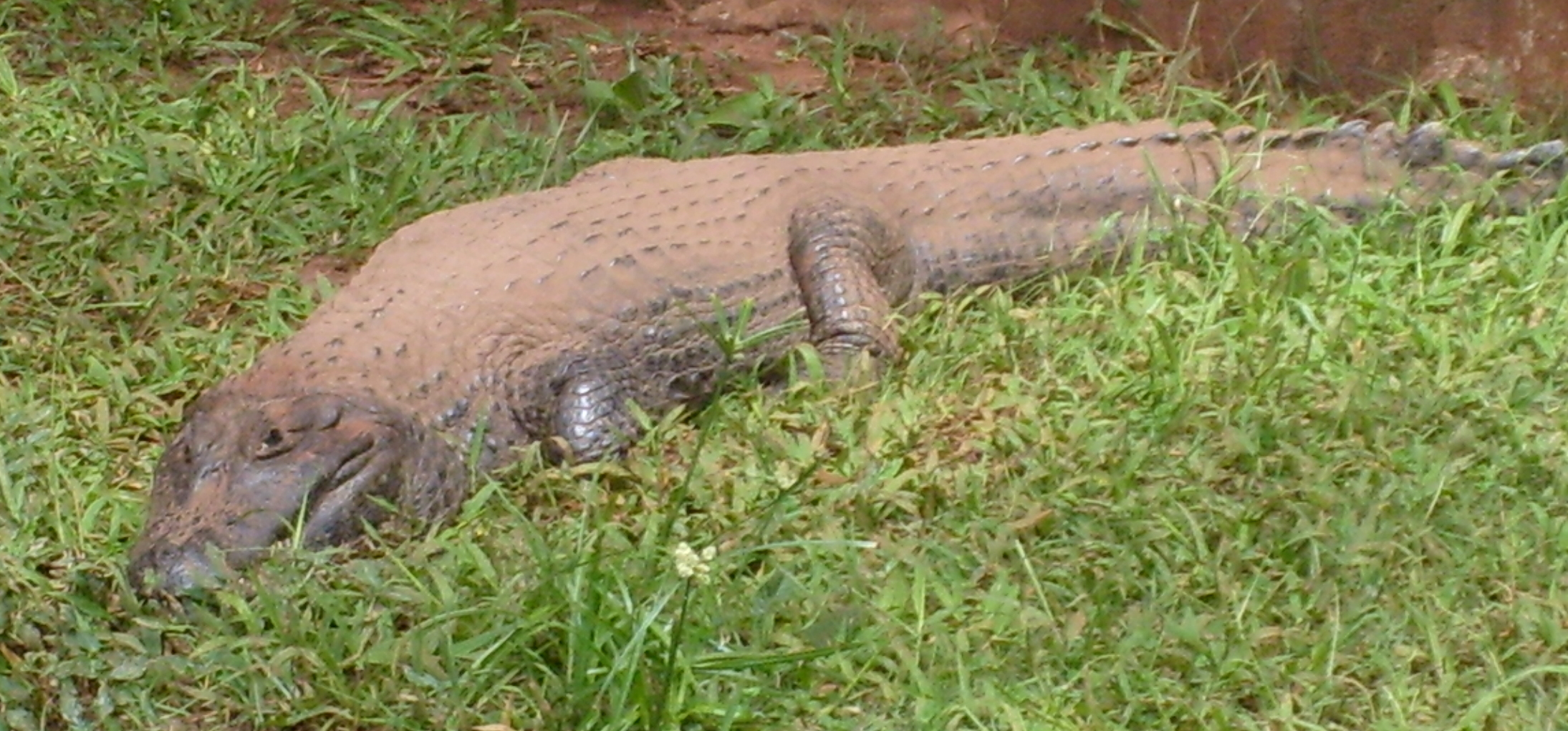 Jacaré do papo amarelo (Caiman latirostris).Zoo in Americana-SP Brasil.